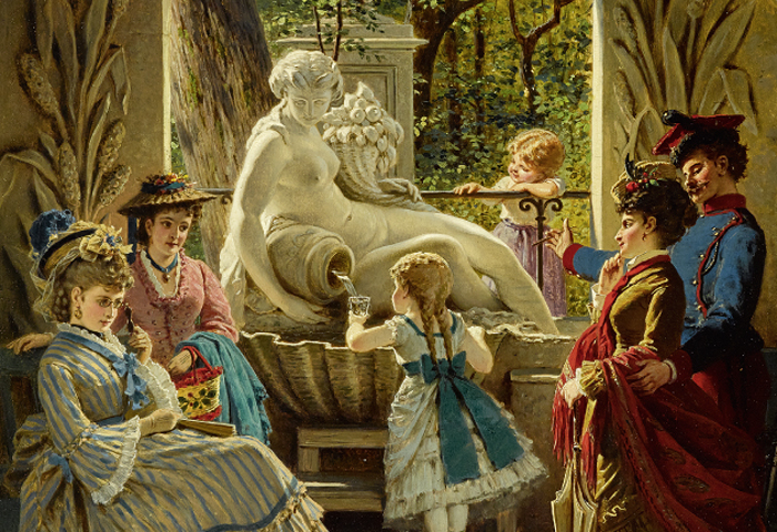 Am Schönen Brunnen (Schönbrunn); Öl auf Holz, 65 x 52 cm - Image cropped!